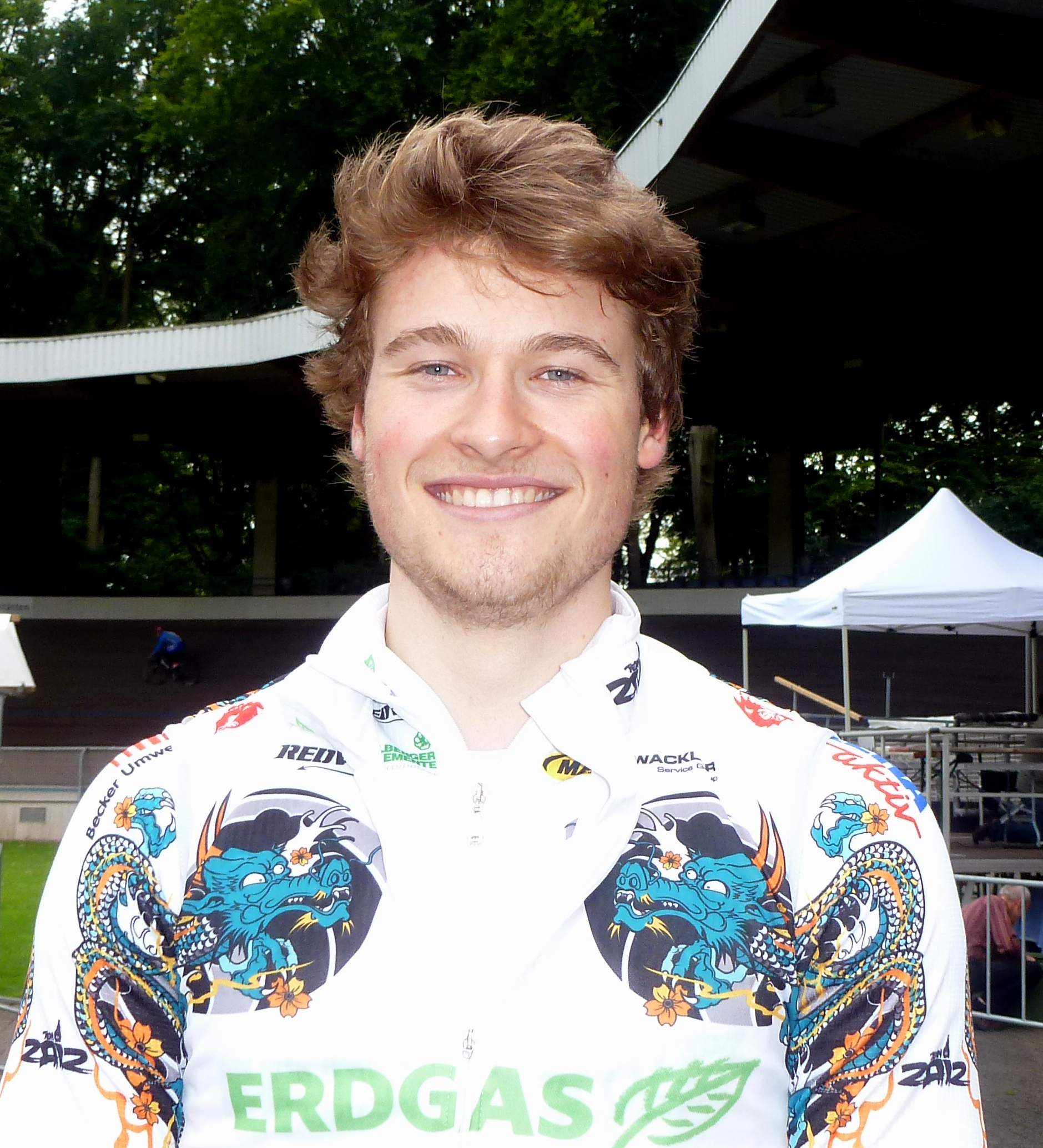 Stefan Bötticher, deutscher Bahnradsportler